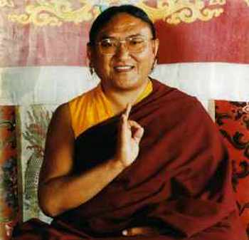 Sakya_Trizin Urheberrechte Mit freundlicher Genehmigung der Betreiber des Pauenhofs [1] und der Sakya-Heritage-Foundation. (GNU-FDL frei)